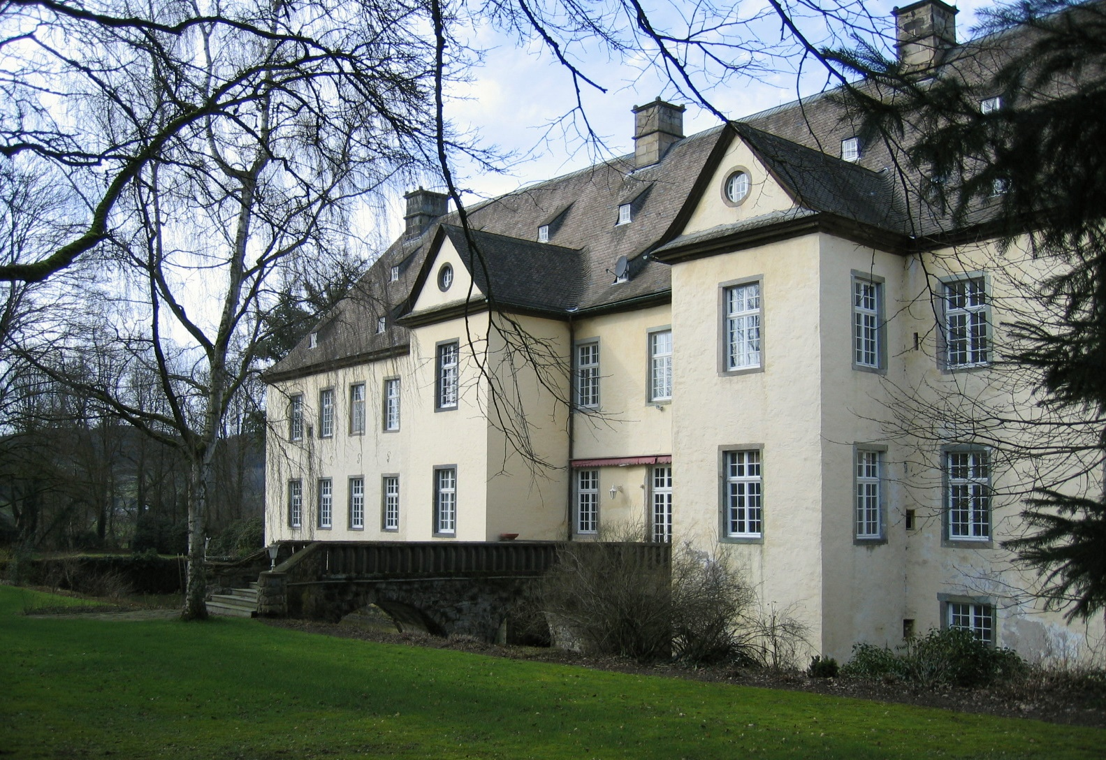 Schloss Wocklum (Privatbesitz) in Balve-Wocklum This image shows a heritage building in Germany, located in the North Rhine-Westphalian city Balve (no. 6).